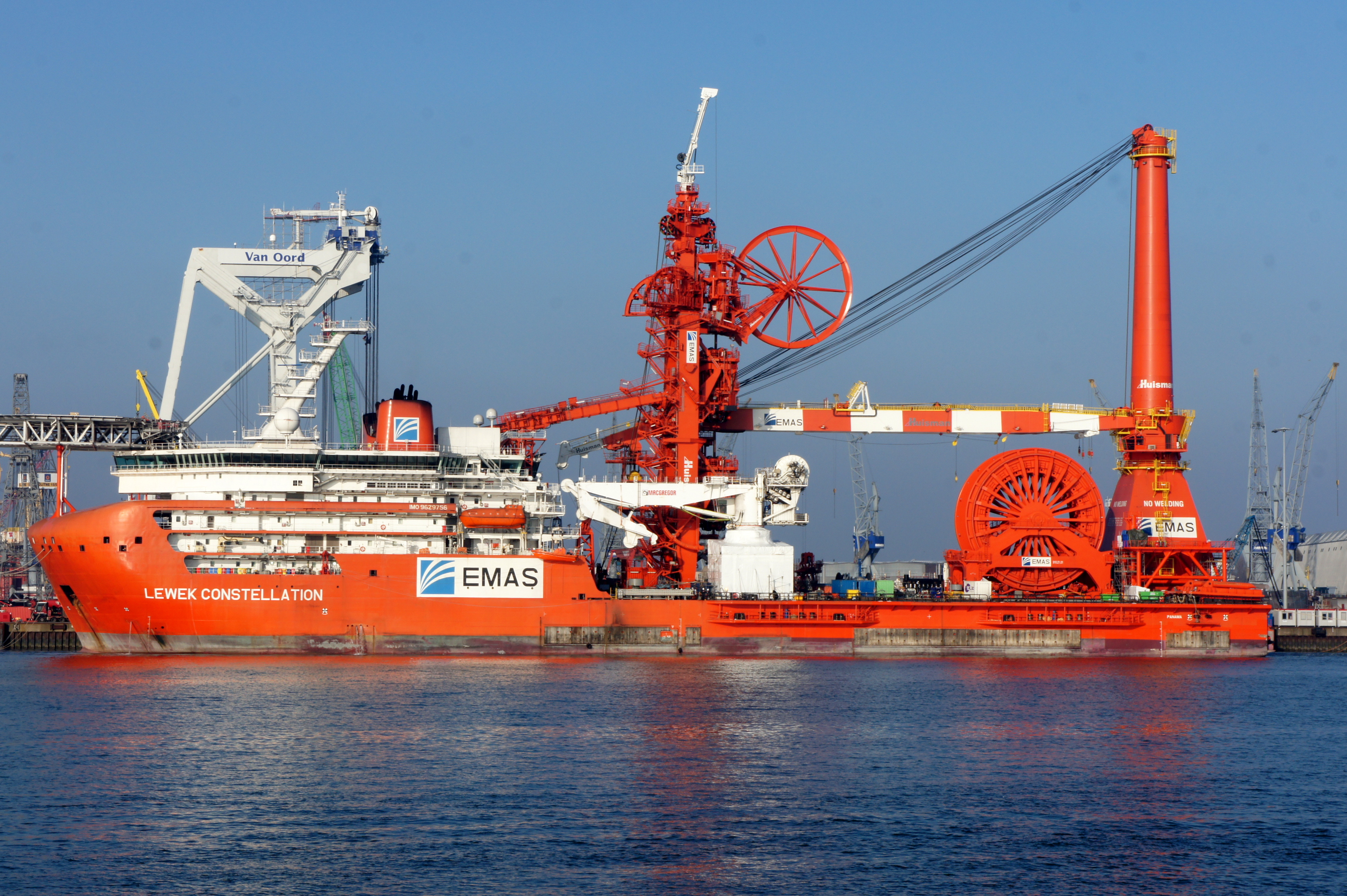 LEWEK CONSTELLATION IMO 9629756, Nieuwe Maas, Port of Rotterdam.